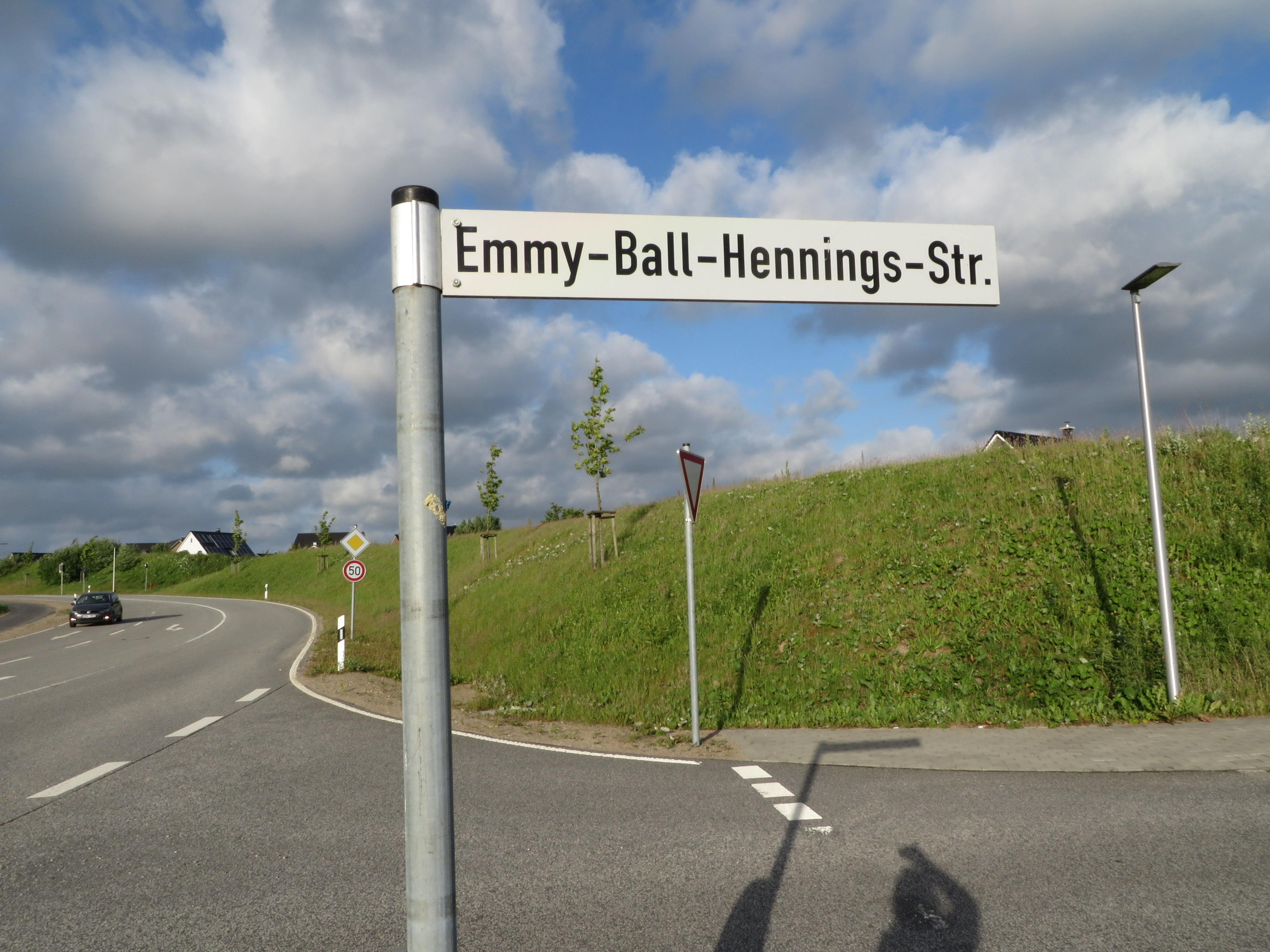 Straßenschild Emmy-Ball-Hennings-Straße mit Shadow Selfie